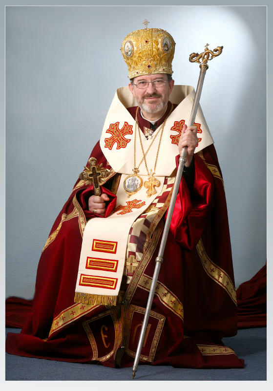 Diözesanbischof Milan Sasik